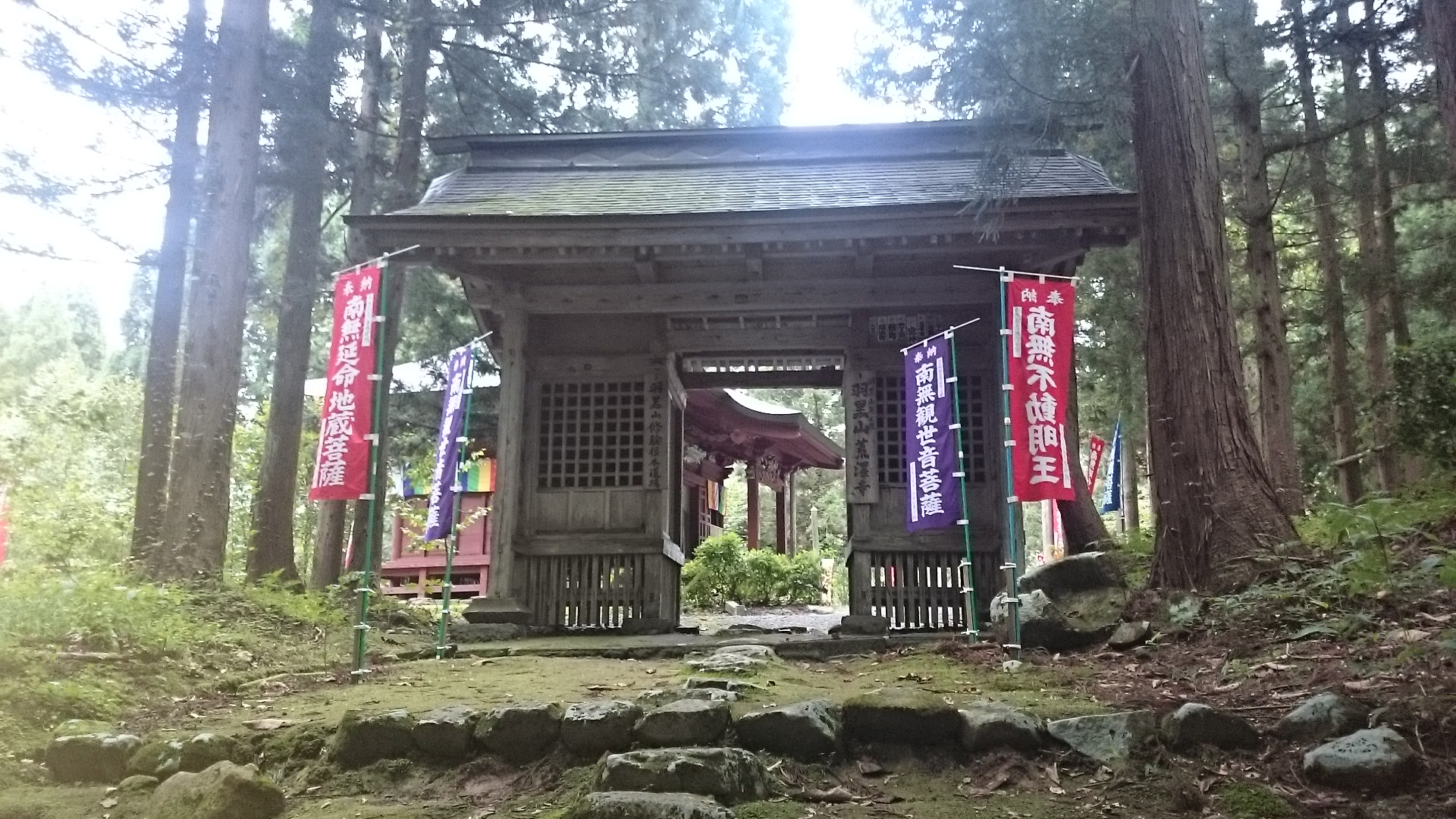 荒沢寺山門